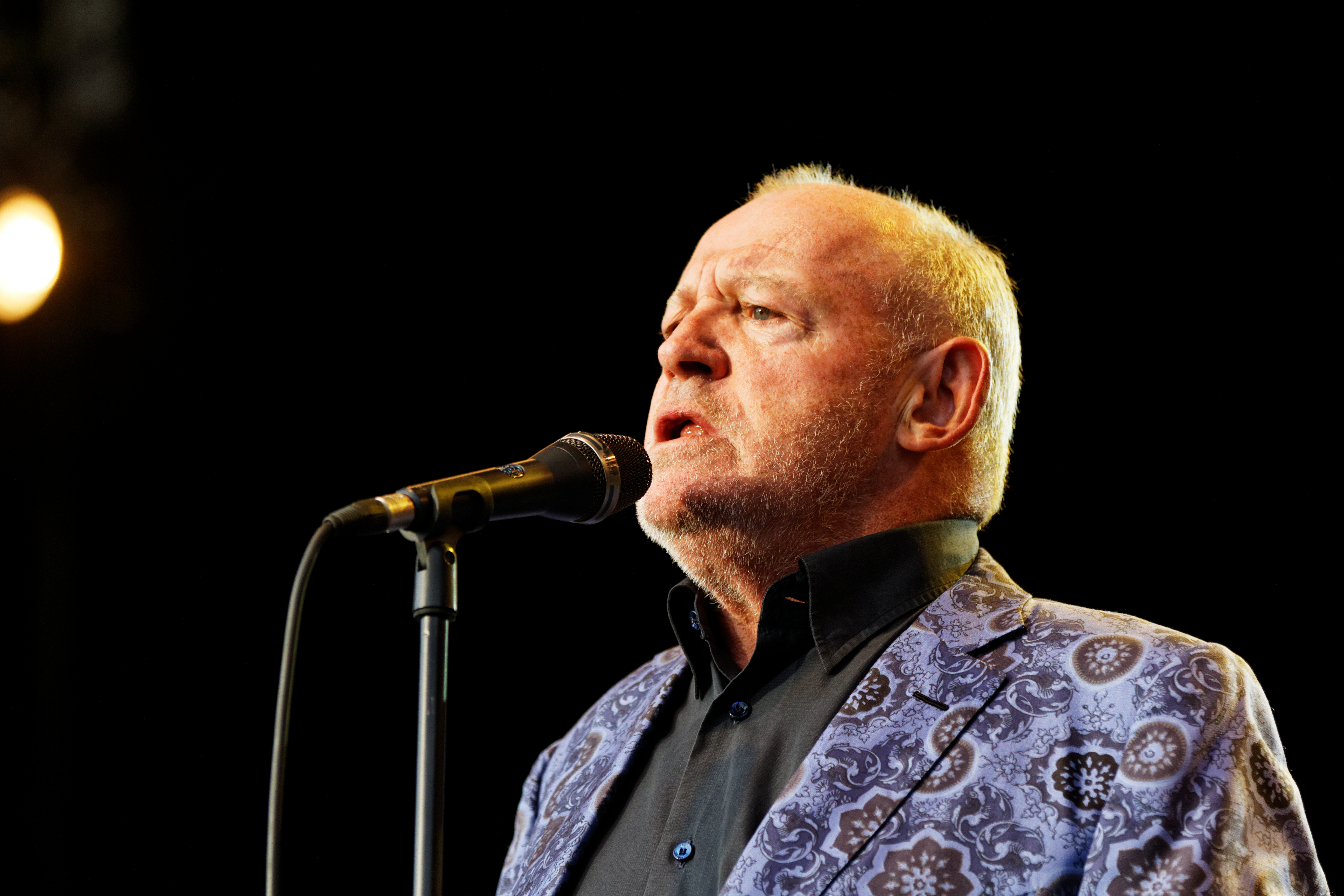 Joe Cocker en concert sur la scène Landaoudec lors du Festival du Bout du Monde à Crozon dans le Finistère (France).